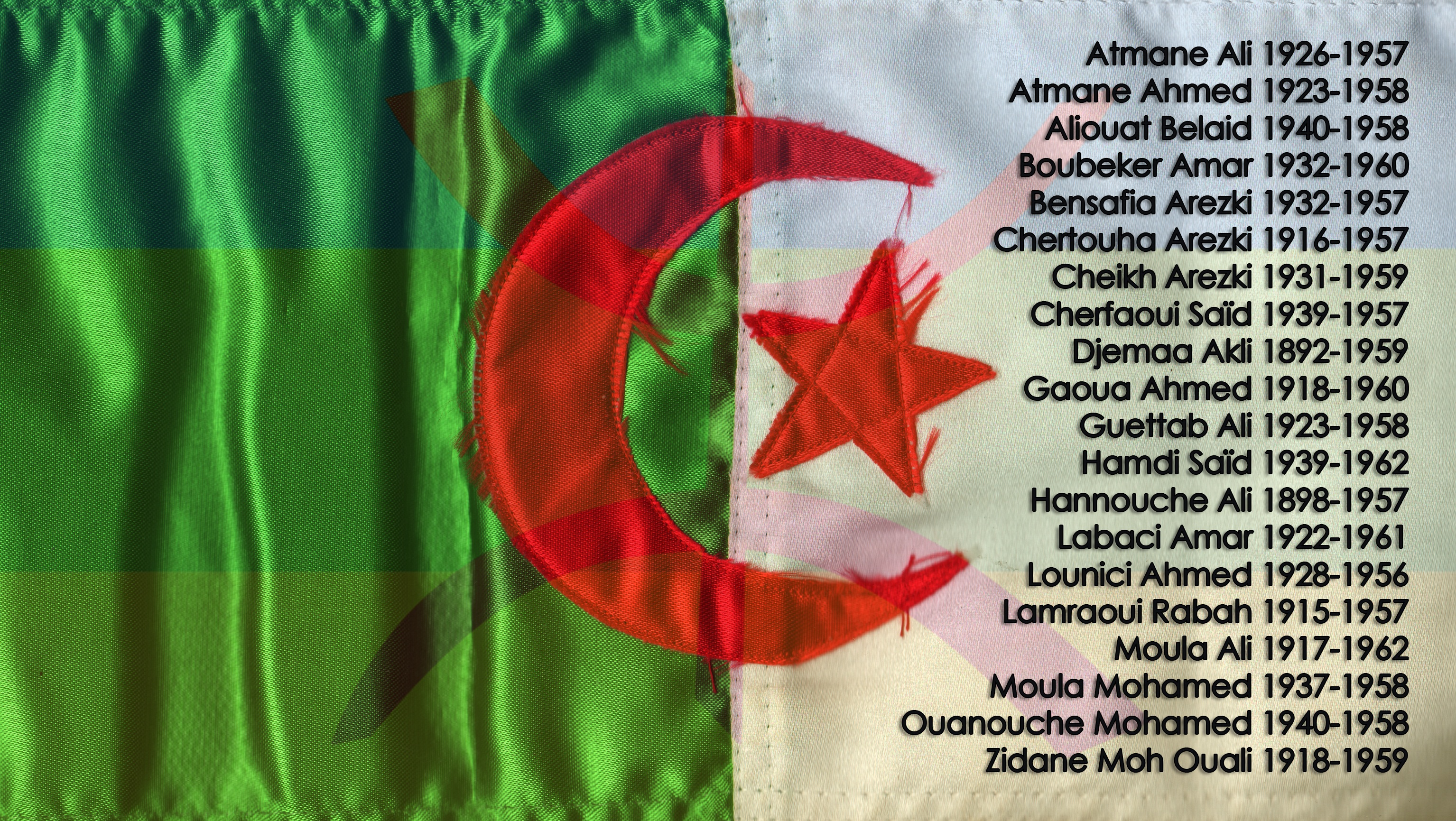 La liste des martyrs du village de Tala Athmane pendent la guerre d'Algérie